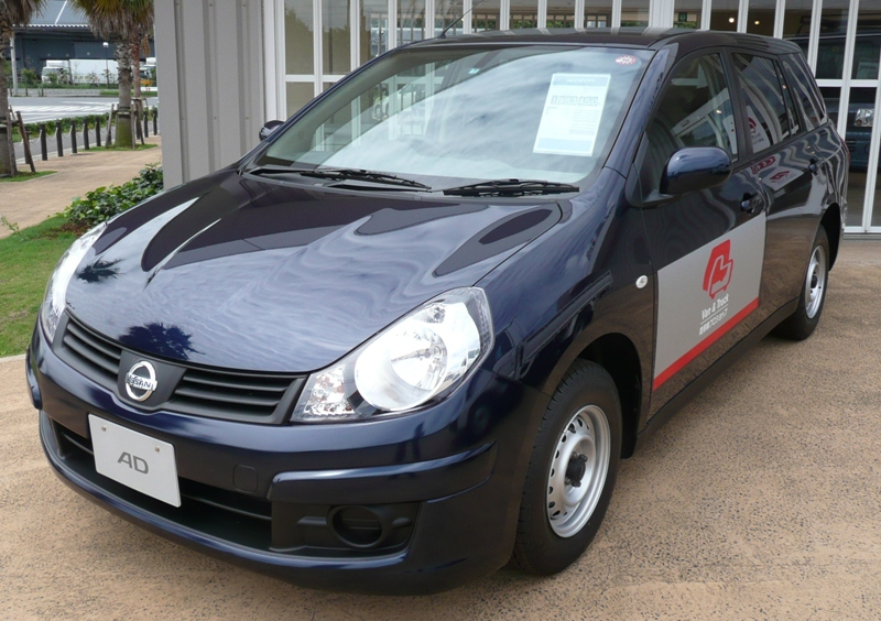 Nissan AD expert.